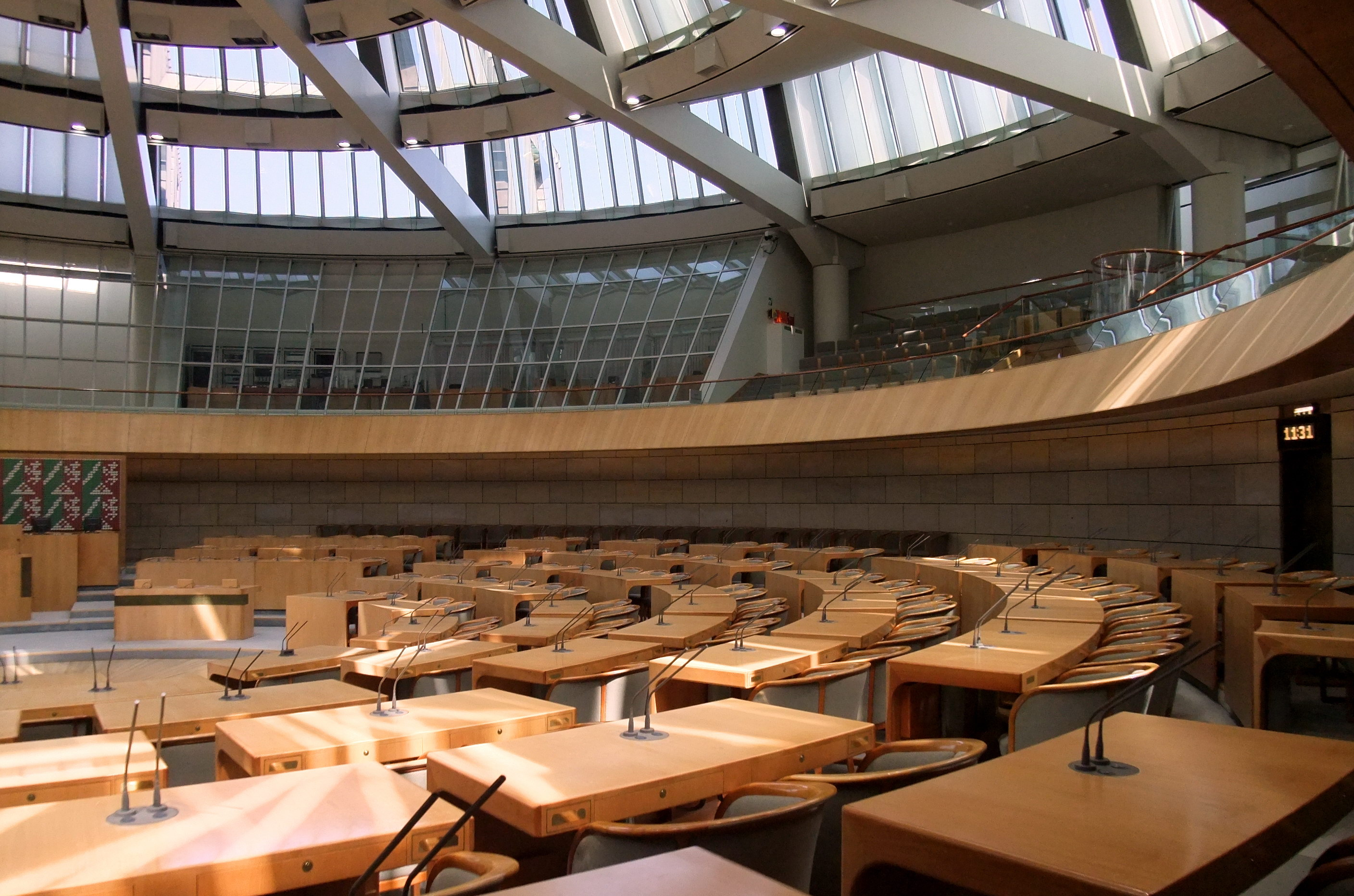 Landtag Düsseldorf